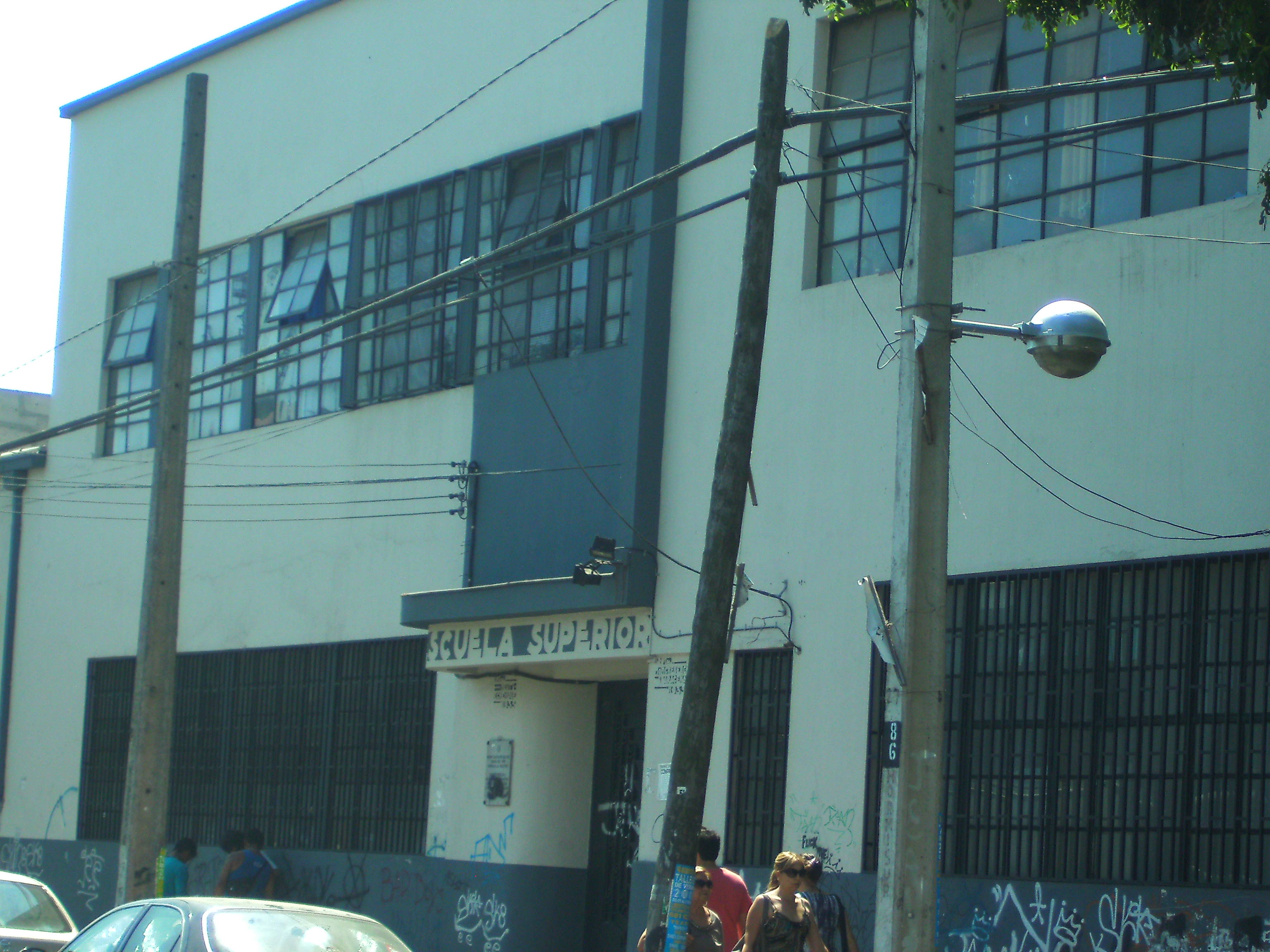 Edificio de la Sociedad de Instrucción Primaria o antiguas Escuelas Matte